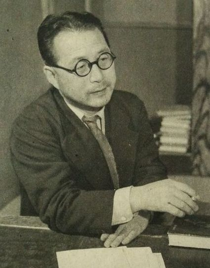 芳賀幸四郎